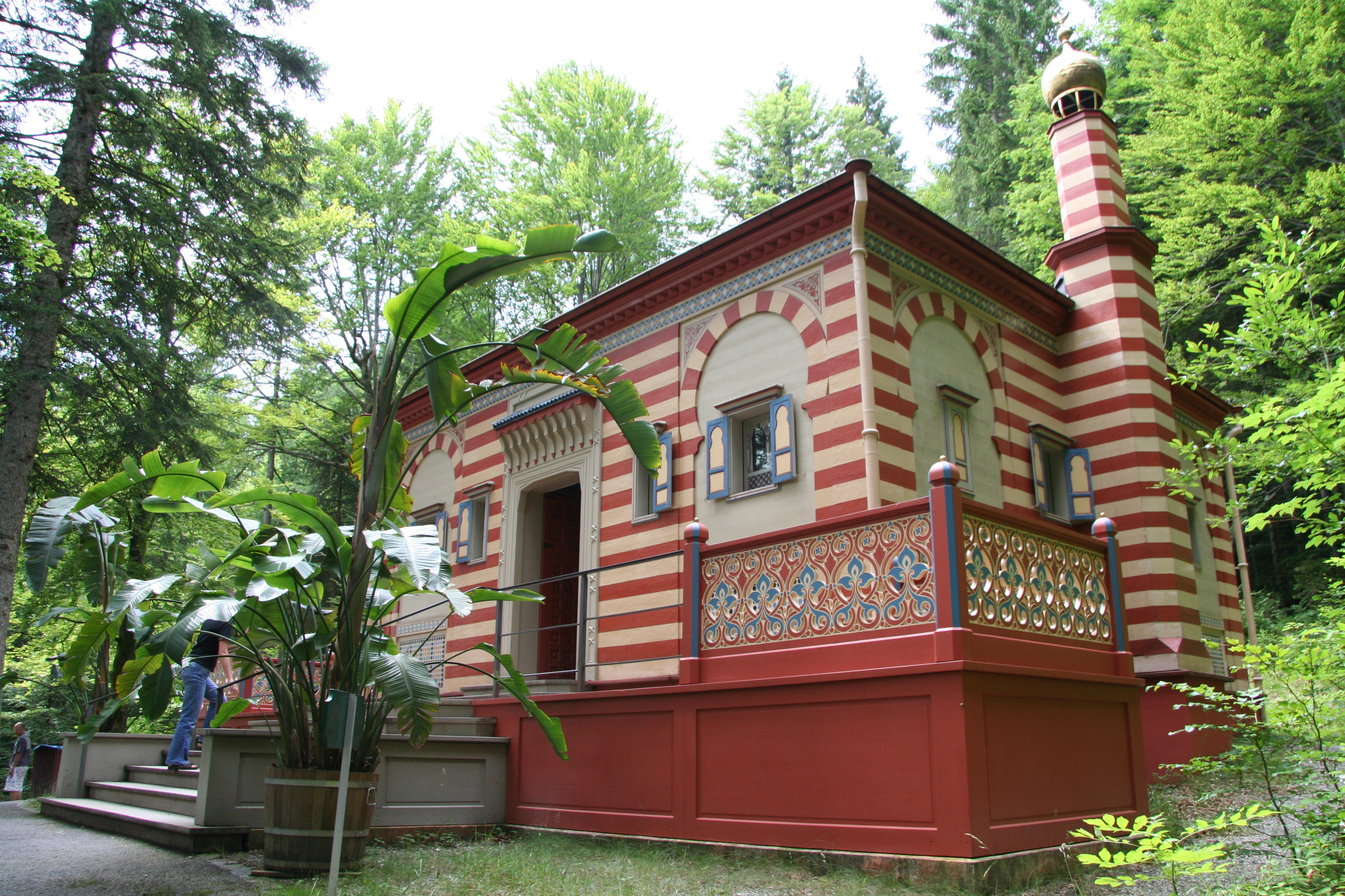 Maurisches Haus Aussenansicht